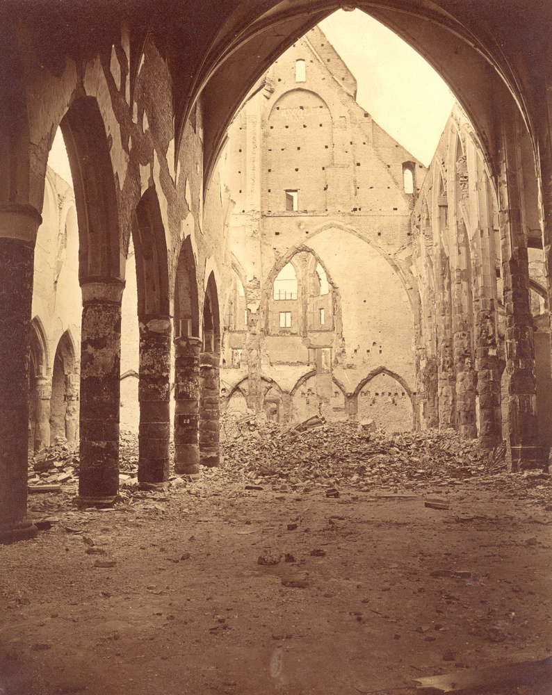 Georg Maria Eckert, Strasbourg, bombardement de 1870, intérieur du Temple Neuf, photographie sur papier albuminé, Musée d'art moderne et contemporain de Strasbourg. 26,1 x 20,3 cm